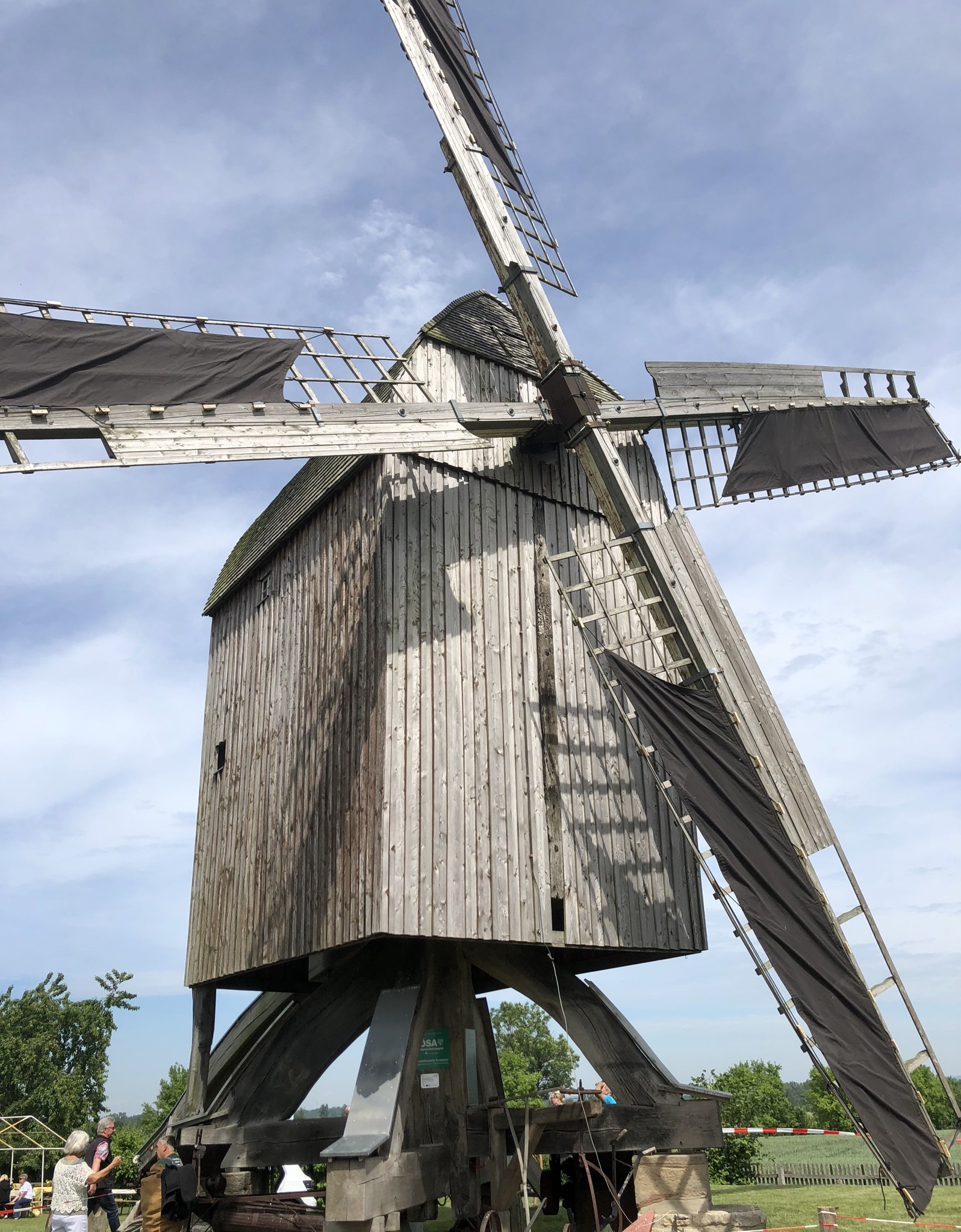 Windmühle südlich von Wulferstedt